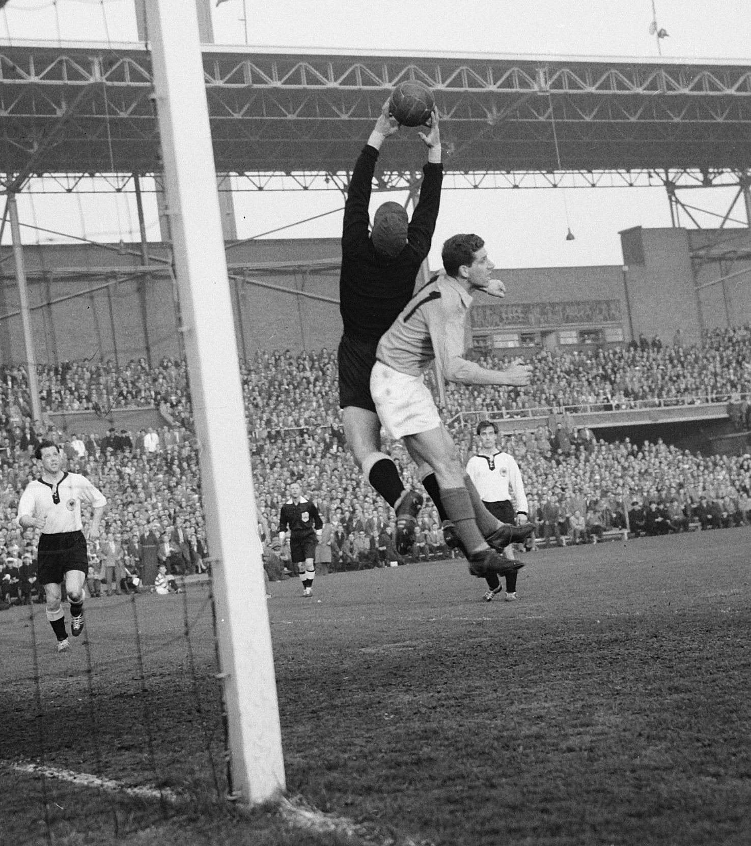 Collectie / Archief : Fotocollectie Anefo Reportage / Serie : [ onbekend ] Beschrijving : Voetbal Nederland tegen Duitsland in Olympisch Stadion Amsterdam. Tilkowski en van der Gijp Datum : 3 april 1957 Locatie : Amsterdam, Noord-Holland Trefwoorden : sport, voetbal Instellingsnaam : Olympisch Stadion Fotograaf : Noske, J.D. / Anefo Auteursrechthebbende : Nationaal Archief Materiaalsoort : Negatief (zwart/wit) Nummer archiefinventaris : bekijk toegang 2.24.01.04 Bestanddeelnummer : 908-4686